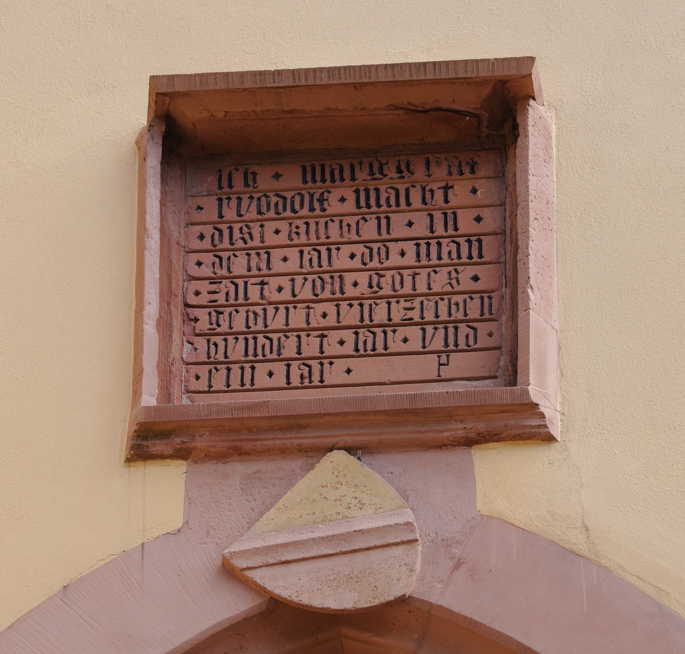 Lörrach: Galluskirche, Gründertafel des Markgrafen Rudolf III. von Hachberg-Sausenberg zum Kirchenneubau im Jahre 1401 über dem Haupteingang ich marggrav ruodolf macht disi kilchen in dem jar do man zalt von gotes geburt vierzechen hundert jar und ein jar [1]